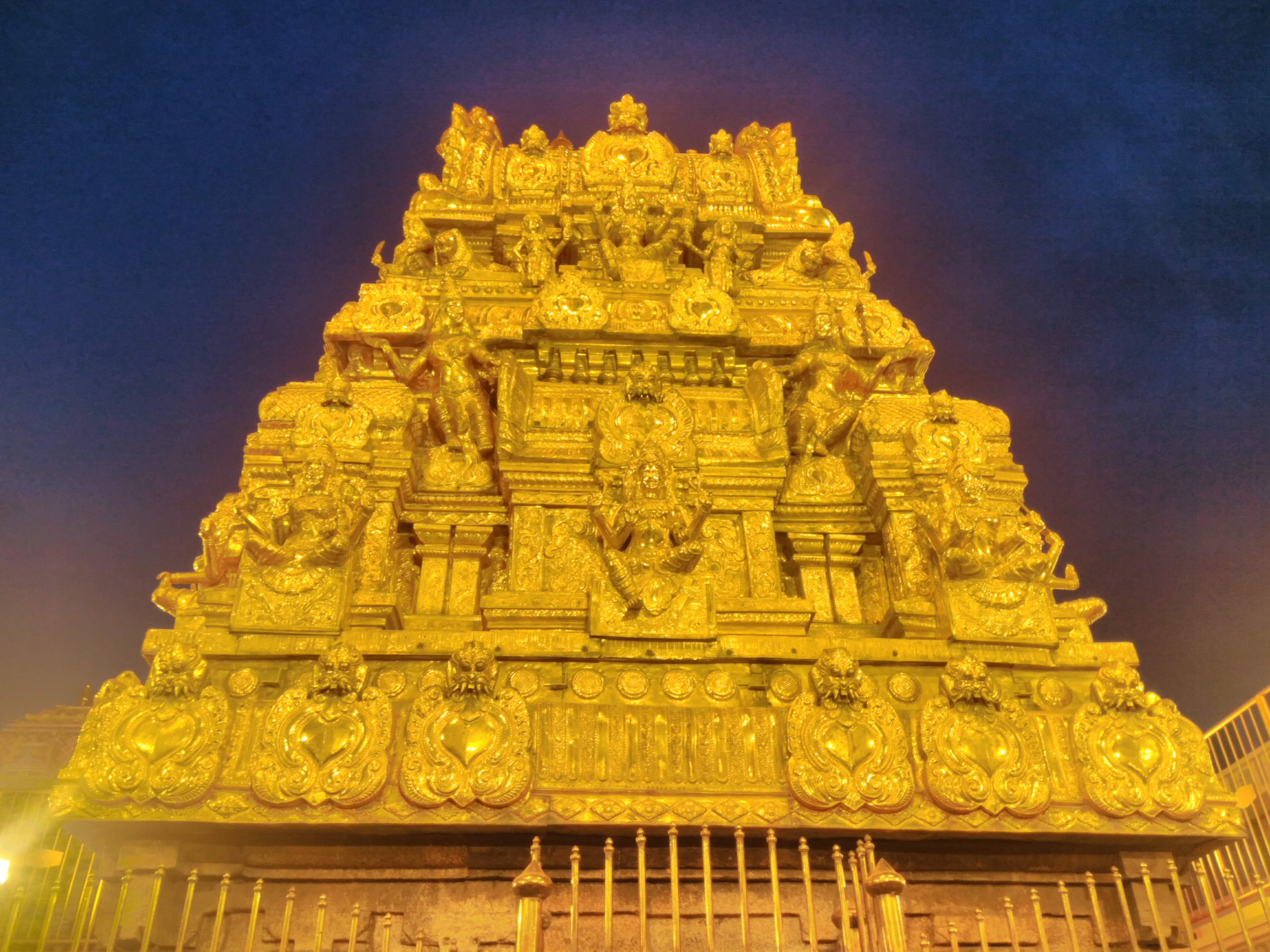 சமயபுரம் மாரியம்மன் கோயிலின் கோபுரம்